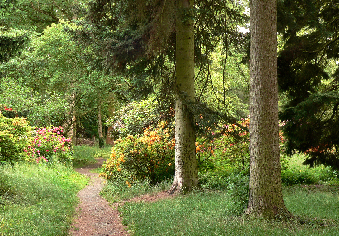 Forstbotanischer Garten Münden, 1988 zum Naturdenkmal erklärt